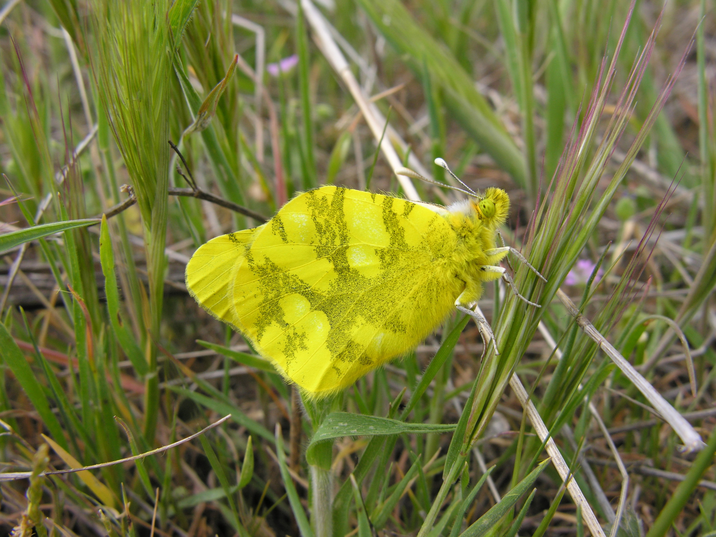 Zegris eupheme (Pieridae), Rivas Vaciamadrid, Madrid, España.